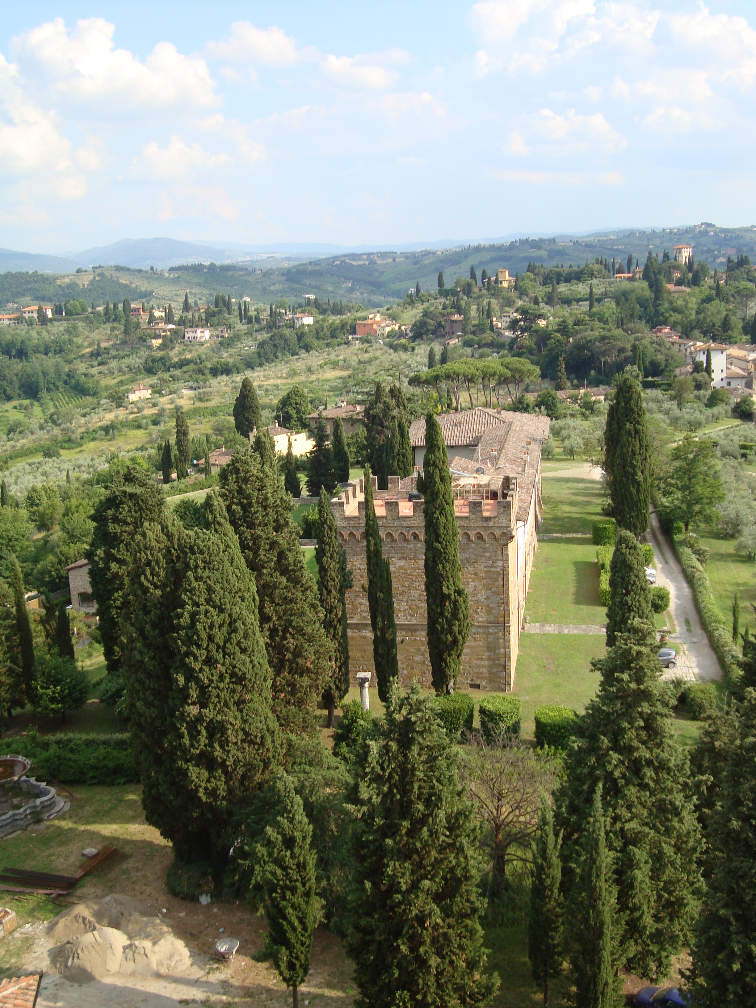 Torre del gallo, veduta, villa la gallina